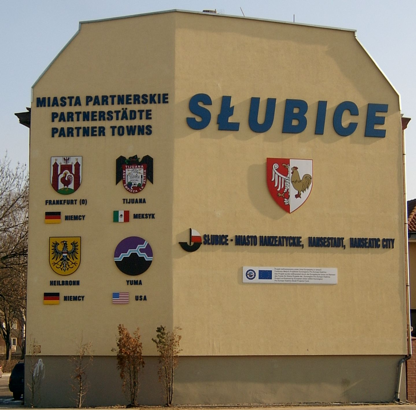 Informacja o miastach partnerskich Słubic na ścianie budynku